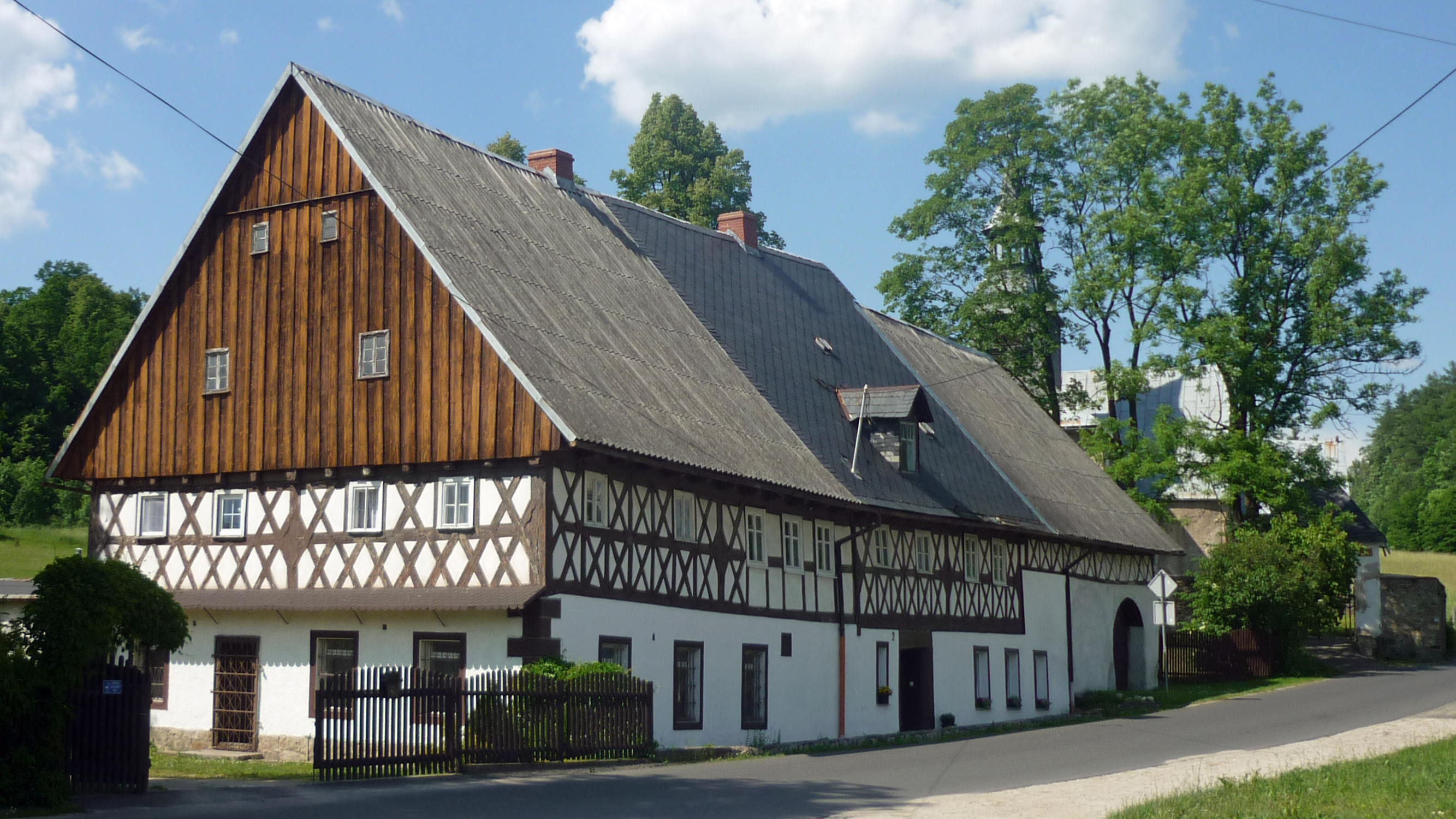 Fachwerkhaus in Bukowiec (Buchwald) im Riesengebirge / Polen